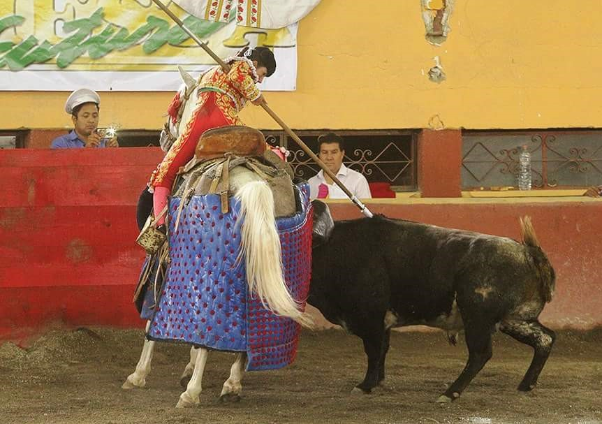 Hilda Tenorio en su primera encerrona se subió al caballo a picar a uno de sus toros.